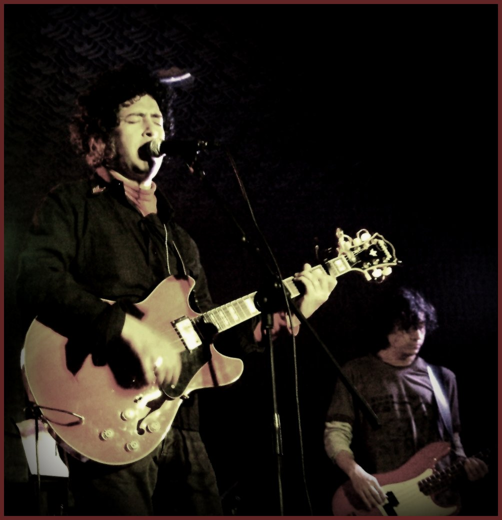 12. Septiembre. 08